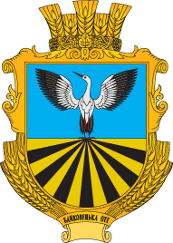 Герб Байковецької сільської громади